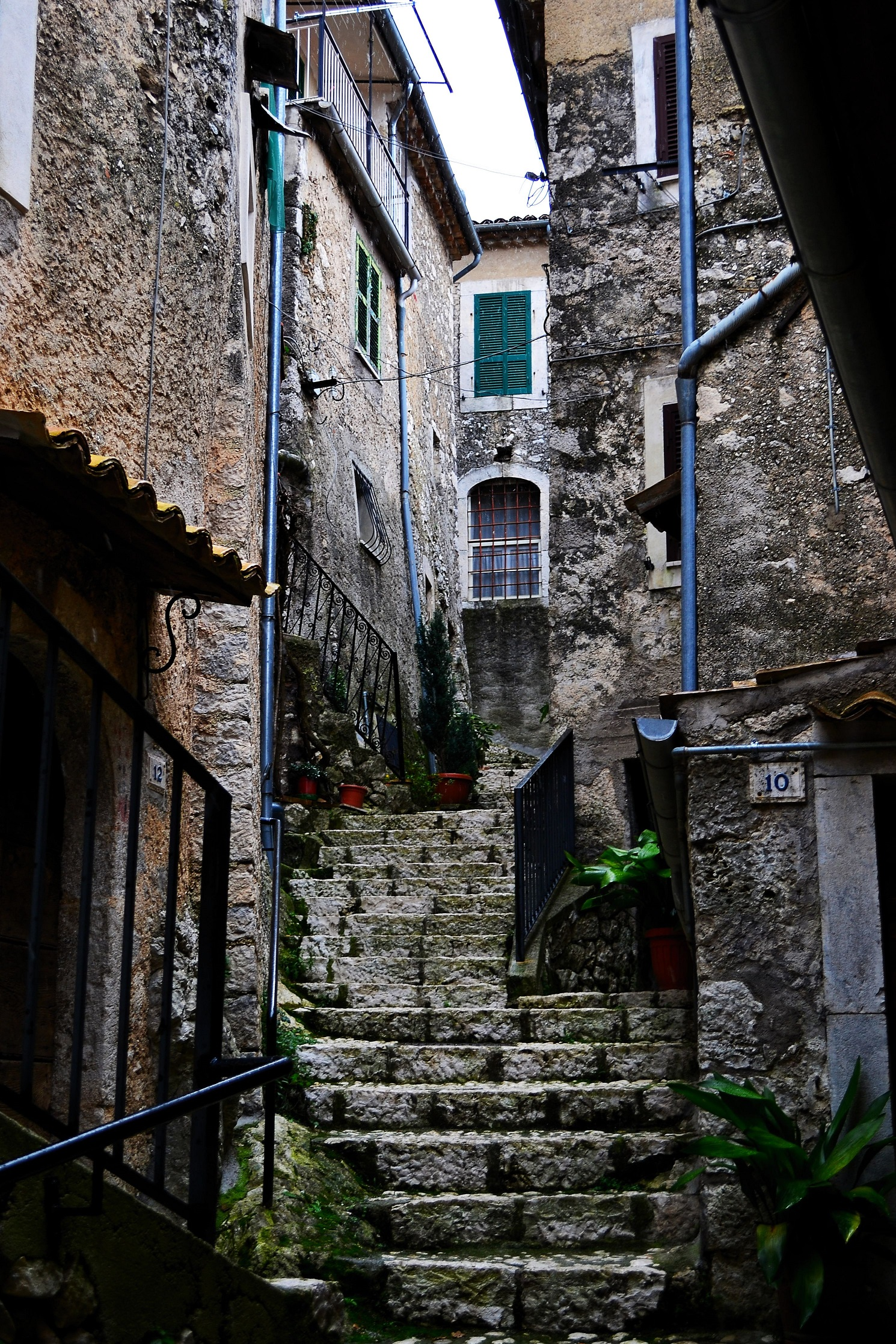 Vicolo Marozzi, con una forma a labirinto...